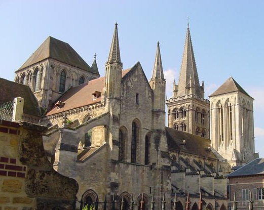 La cathédrale de Lisieux vue du nord-est, c'est-à-dire du jardin public. On aperçoit la tour lanterne et les deux tours de façade. Auteur : Osbern Date : 2002